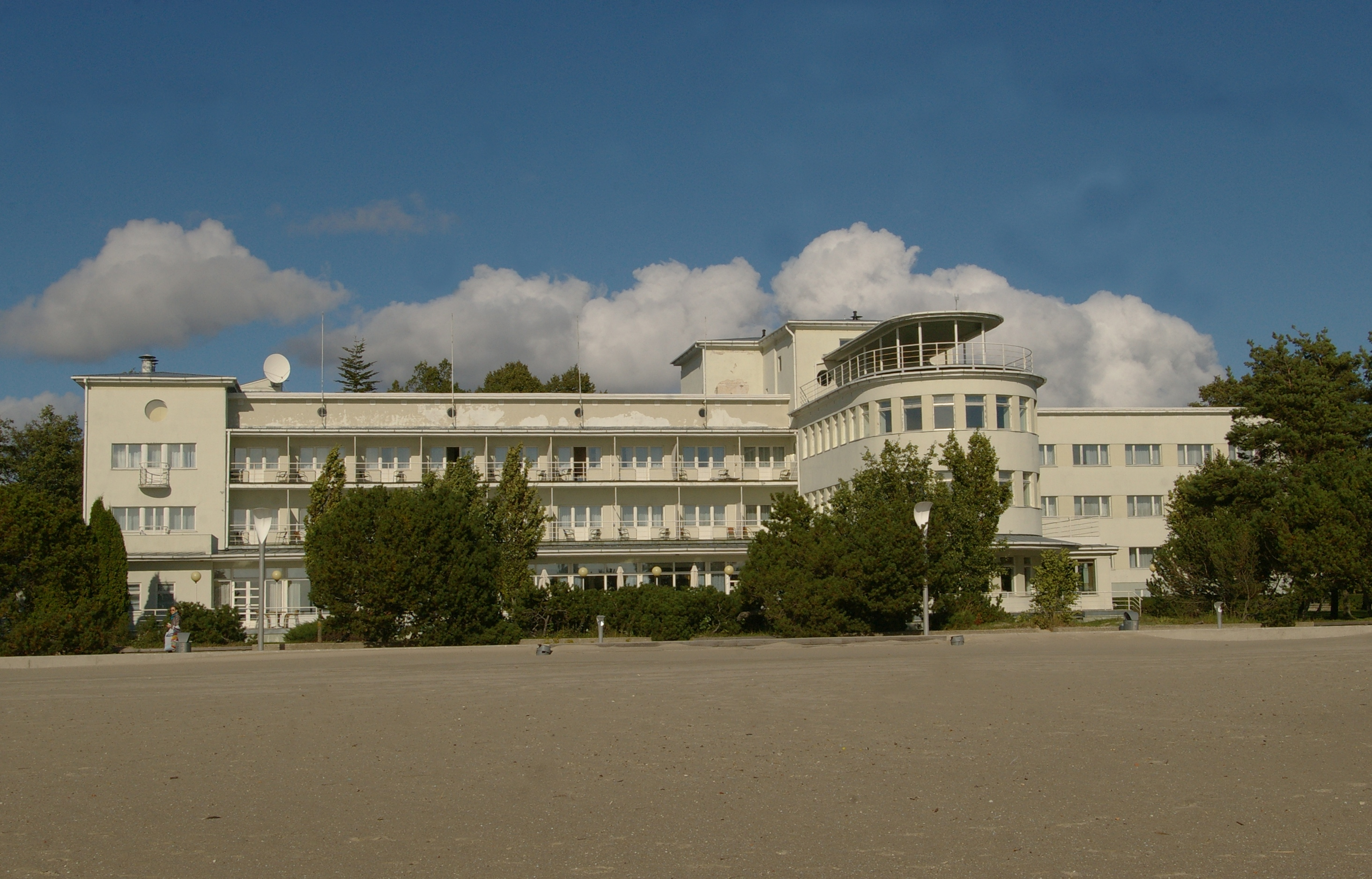 Pärnu rannahotell